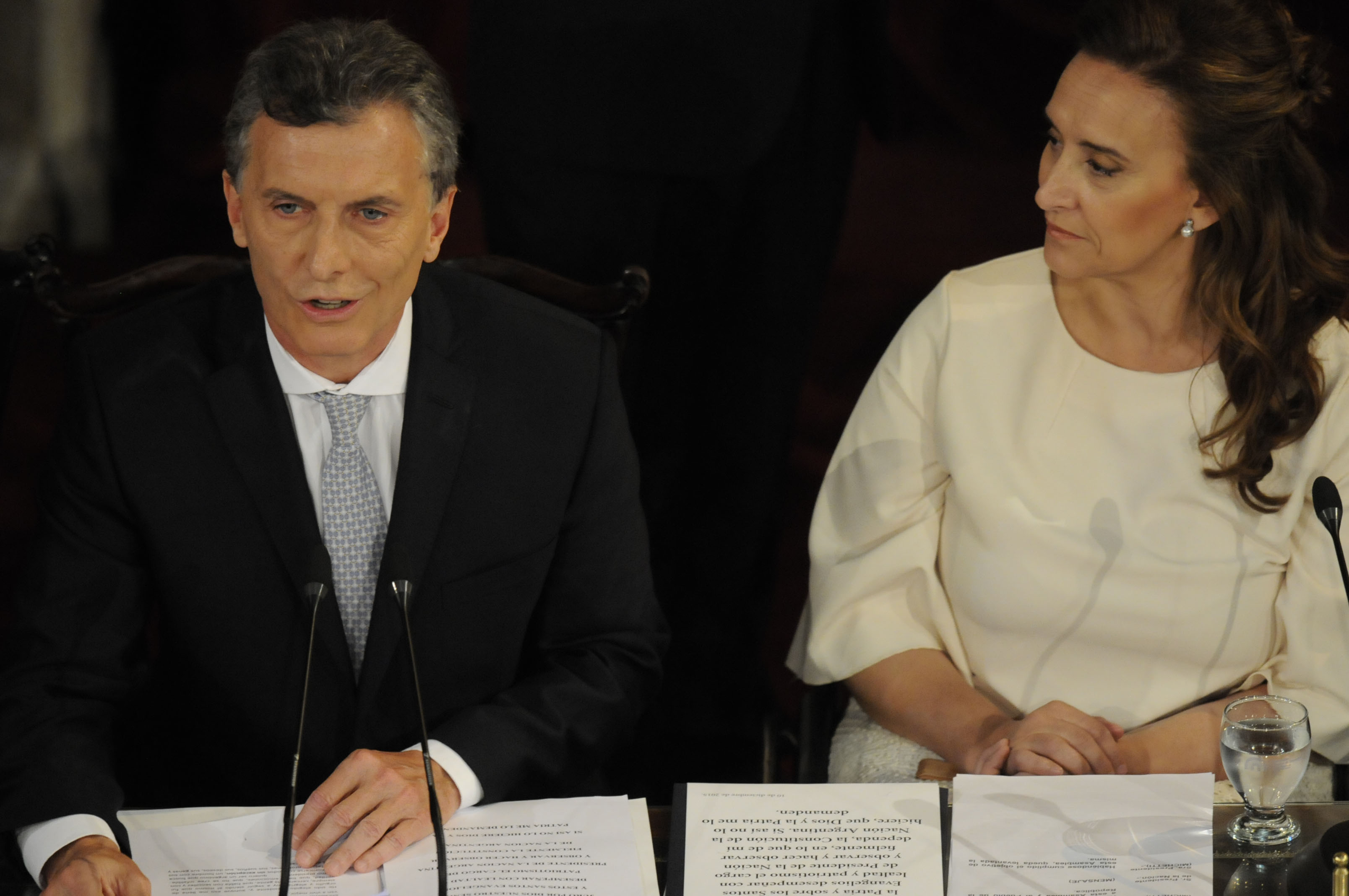 Jura de Mauricio Macri y Gabriela Michetti en el Congreso